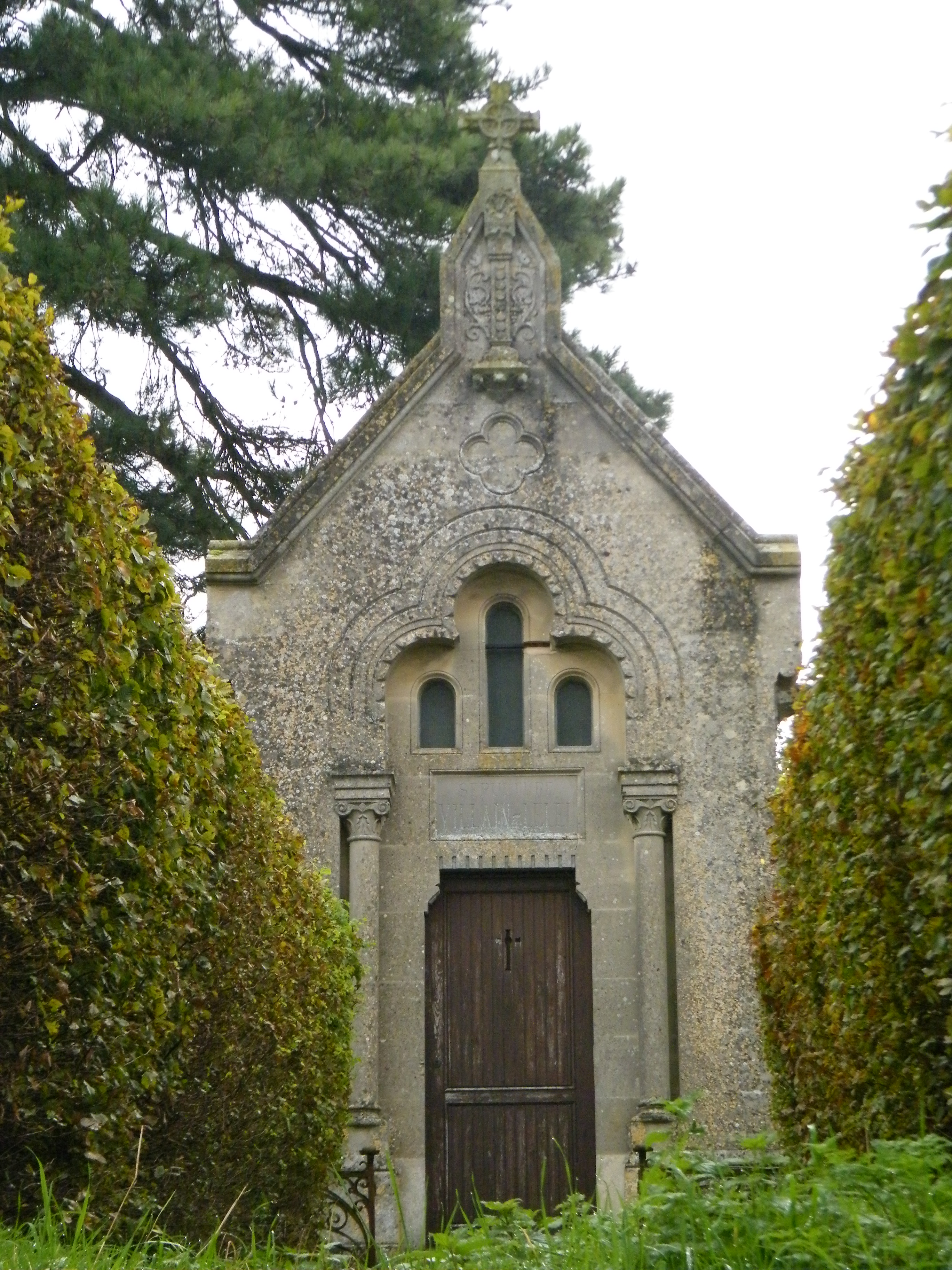 Chapelle privée Villain-Léger, près de l'église.